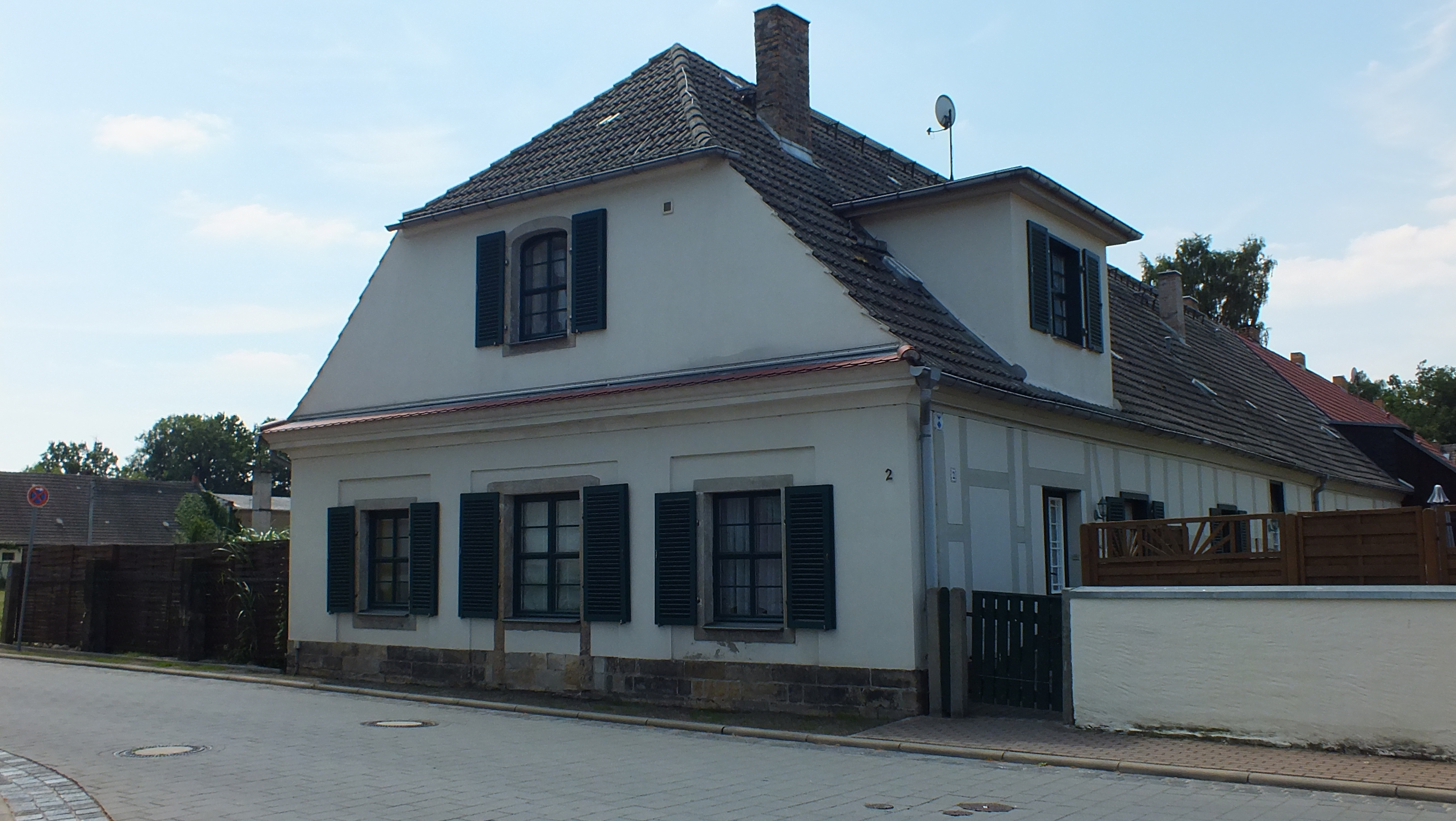 Stuterei Annaburg